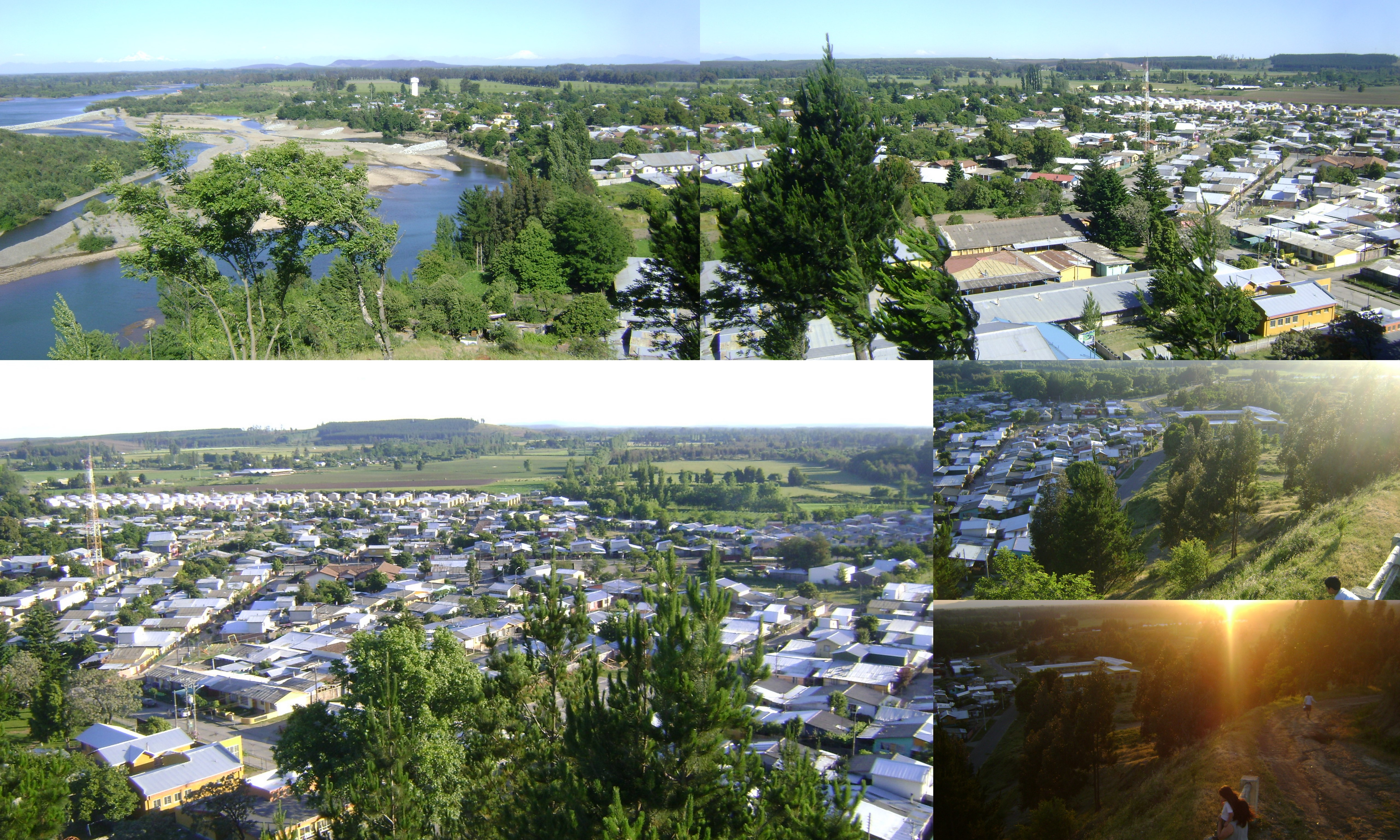 Negrete junto al rio Bio-Bio: vista desde la cima del cerro Mariman